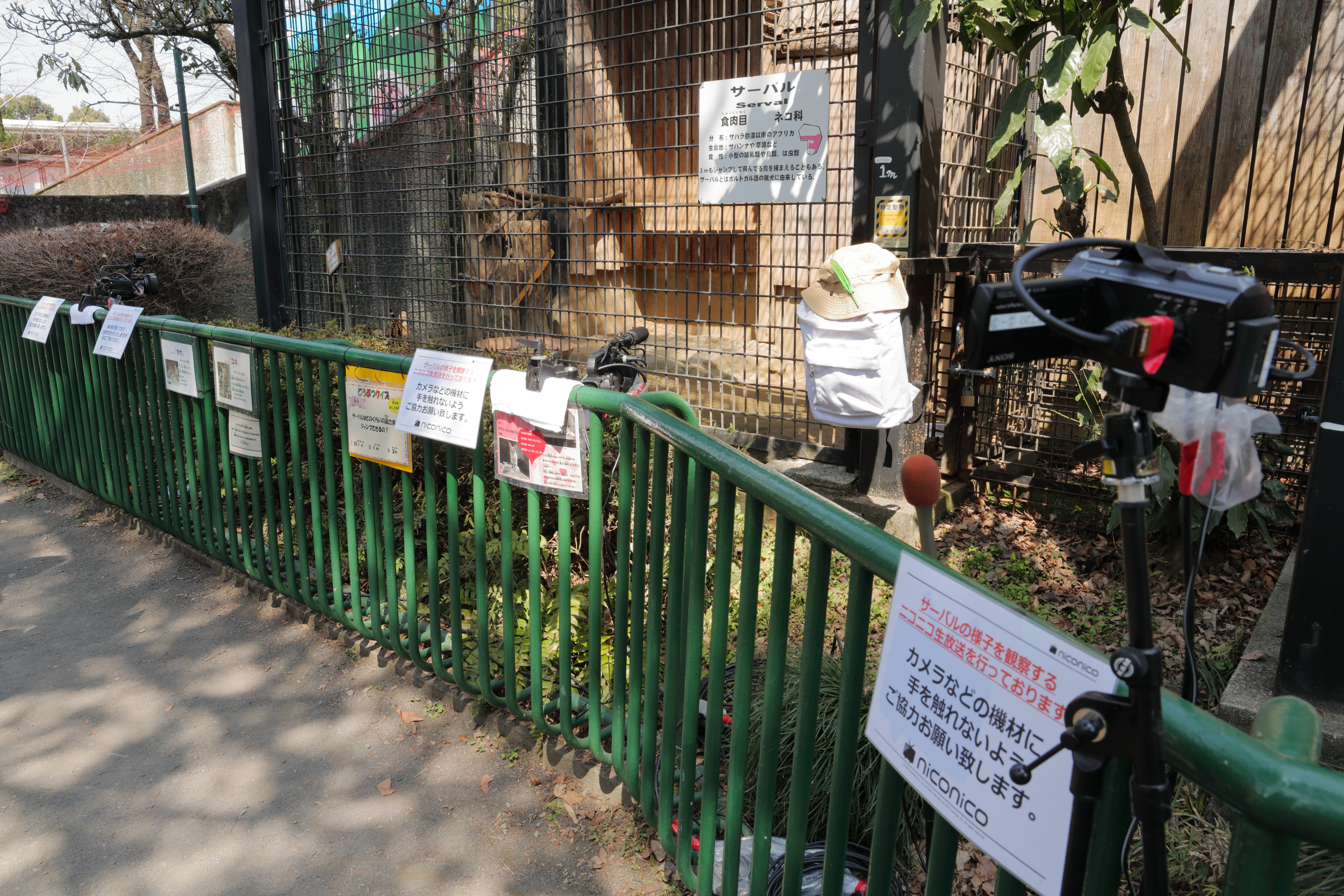 羽村市動物公園、サーバル